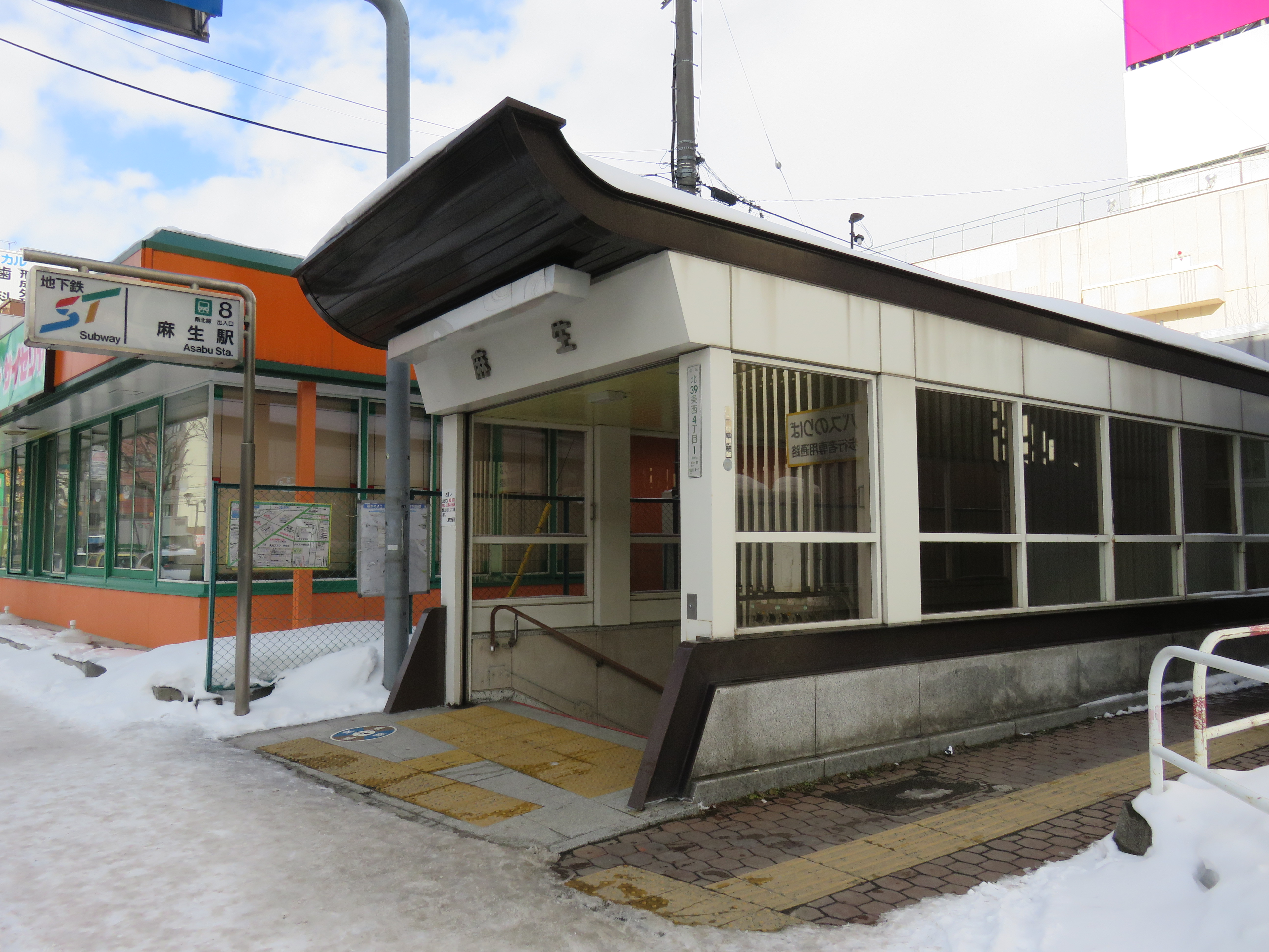 麻生駅8番出入口